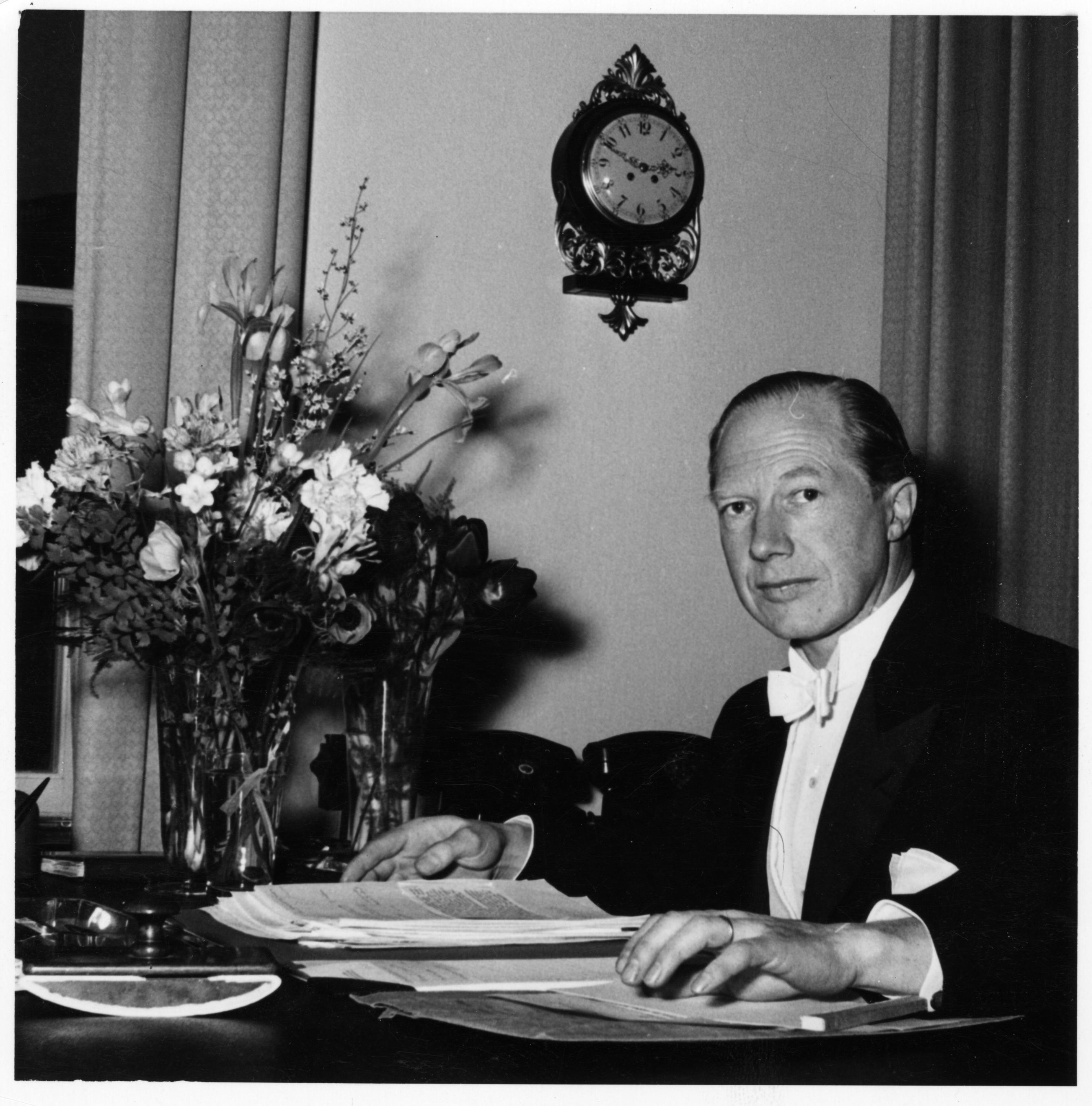 Statsrådet Lars Eliasson vid utnämningen till statsråd 1957.